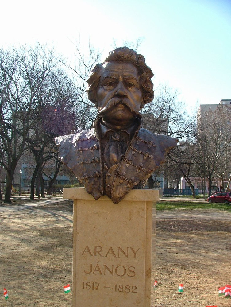 Juha Richárd: Arany János mellszobra (Debrecen, Hajó utca)